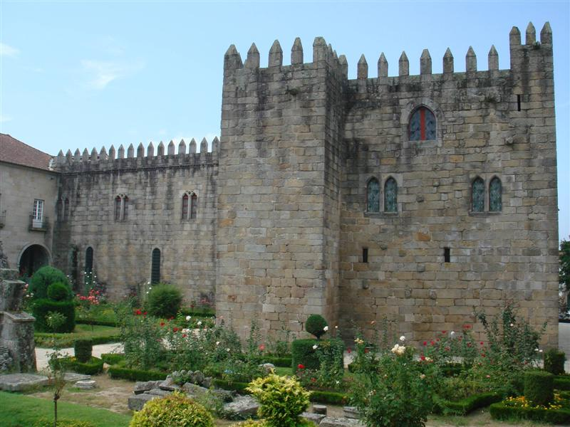 Edificio do Paço Arquipiscopal de Braga voltado para o Jardim de Santa Bárbara Foto de Jose Goncalves